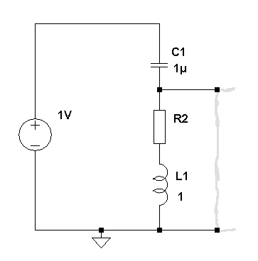 Series resonant circuit